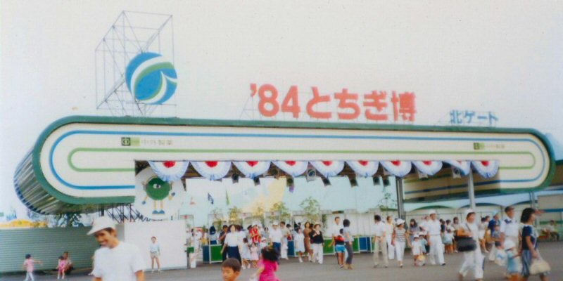 栃木博、ゲート前